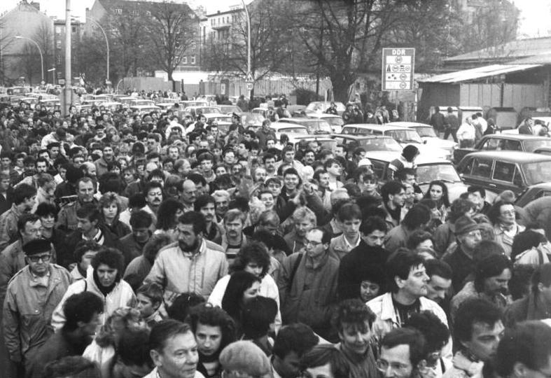 ADN-ZB-Hirschberger-10.11.89-Berlin (West): Nach der neuen Reiseregelung passierten Tausende DDR-Bürger den Grenzübergang in der Invalidenstraße.